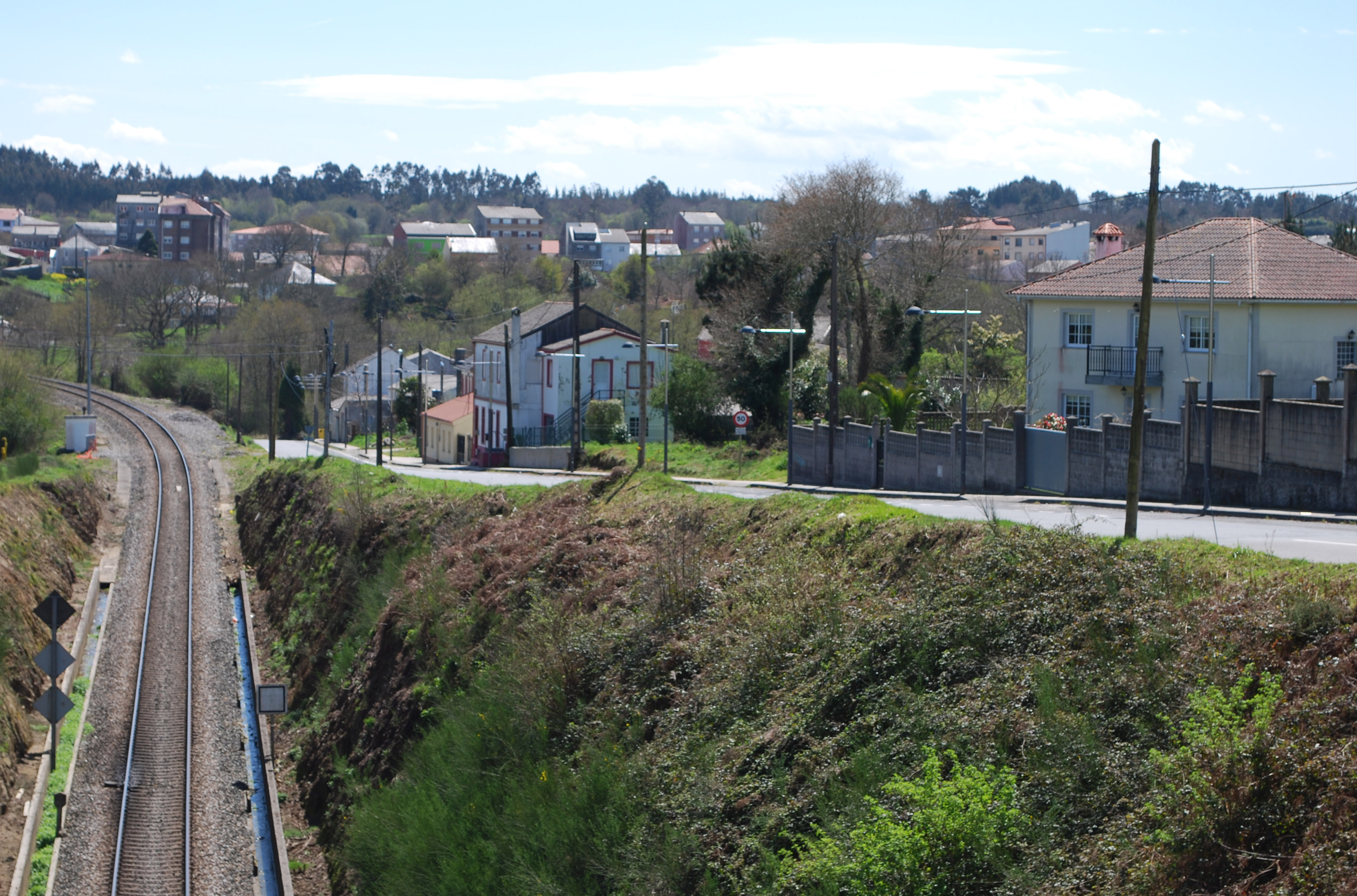 Vista de Paio Rodríguez Concello de Curtis A Coruña Galiza